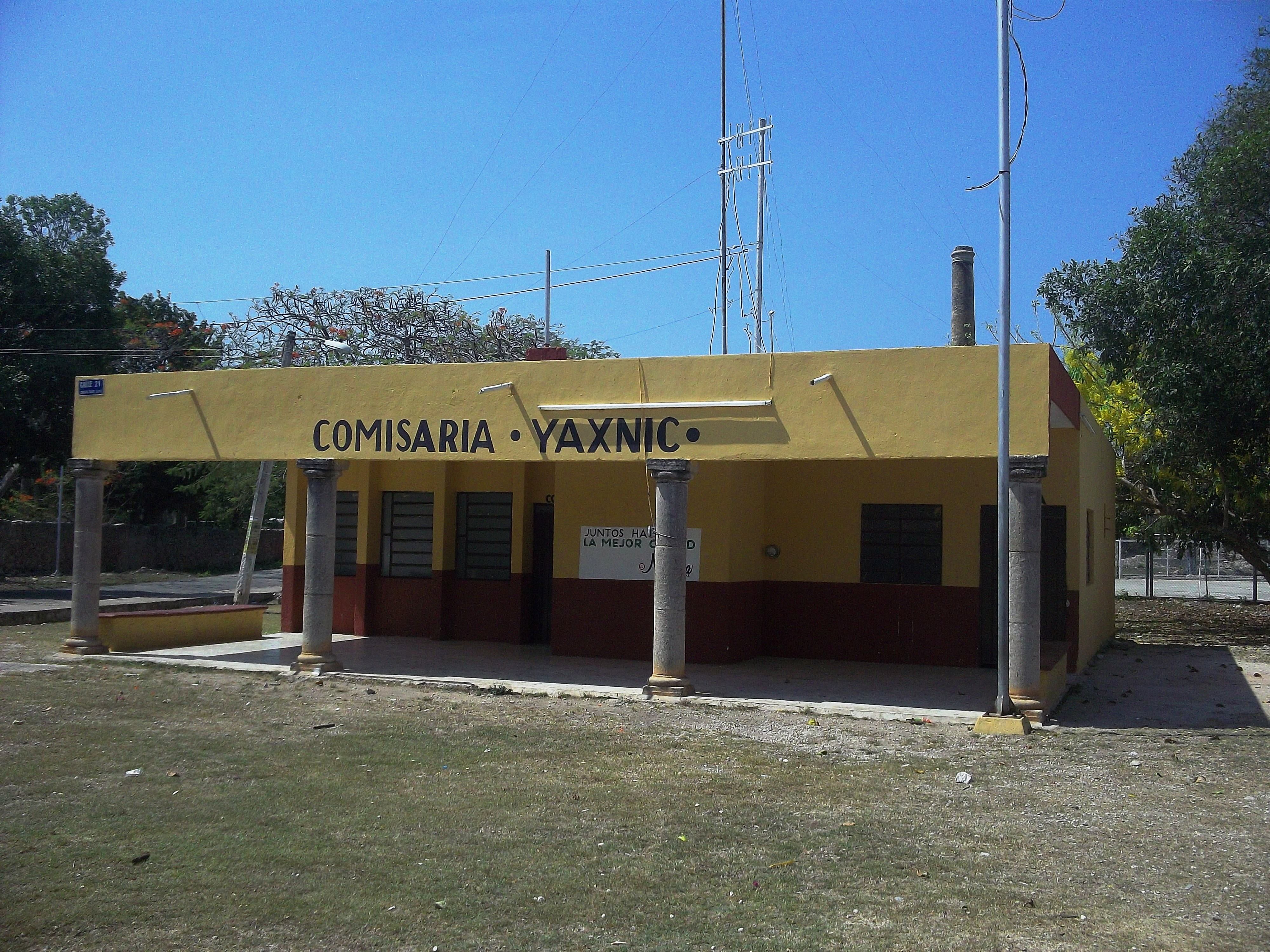 Casa comisarial de Yaxnic, Yucatán.